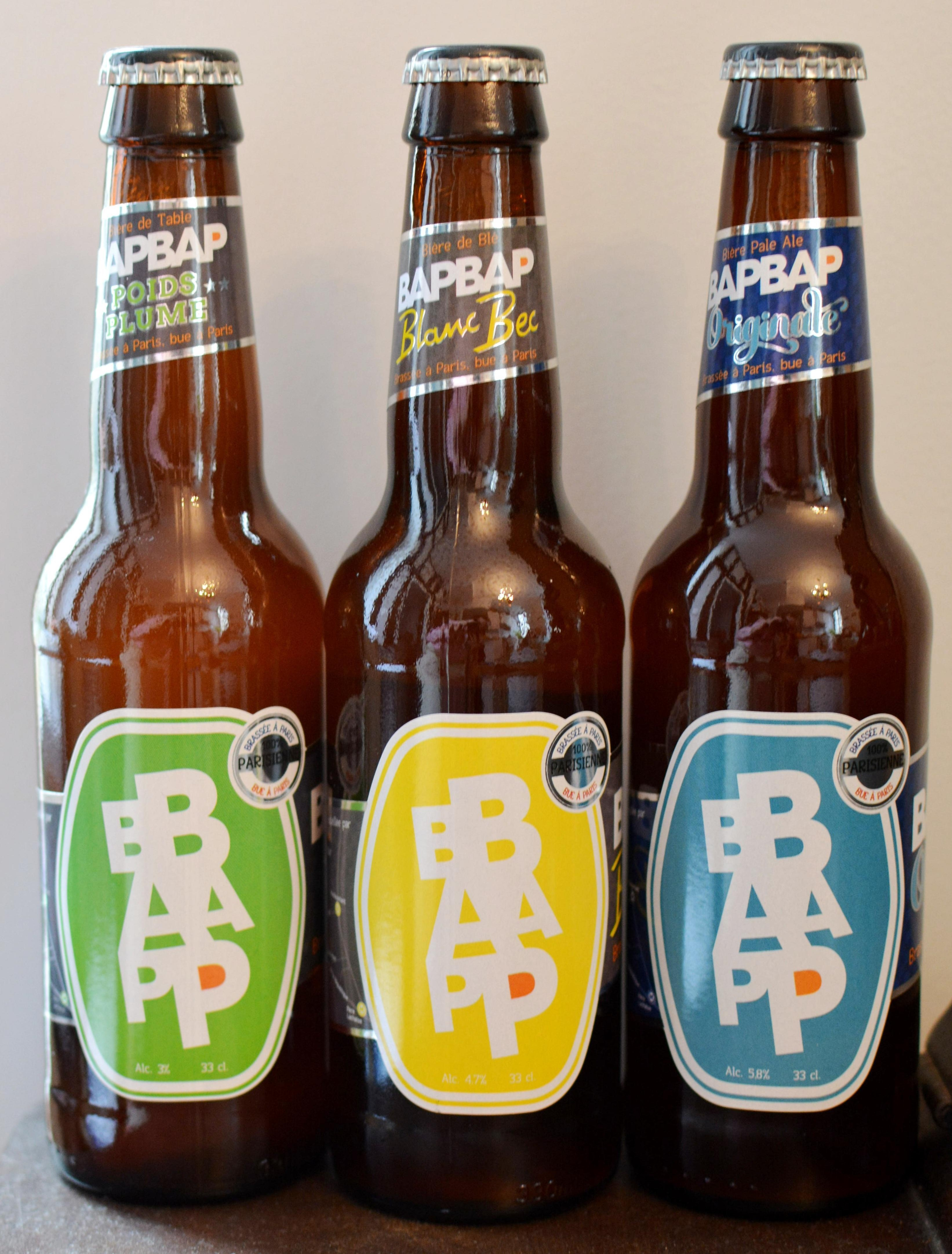 Bouteilles de bière BAPBAP.